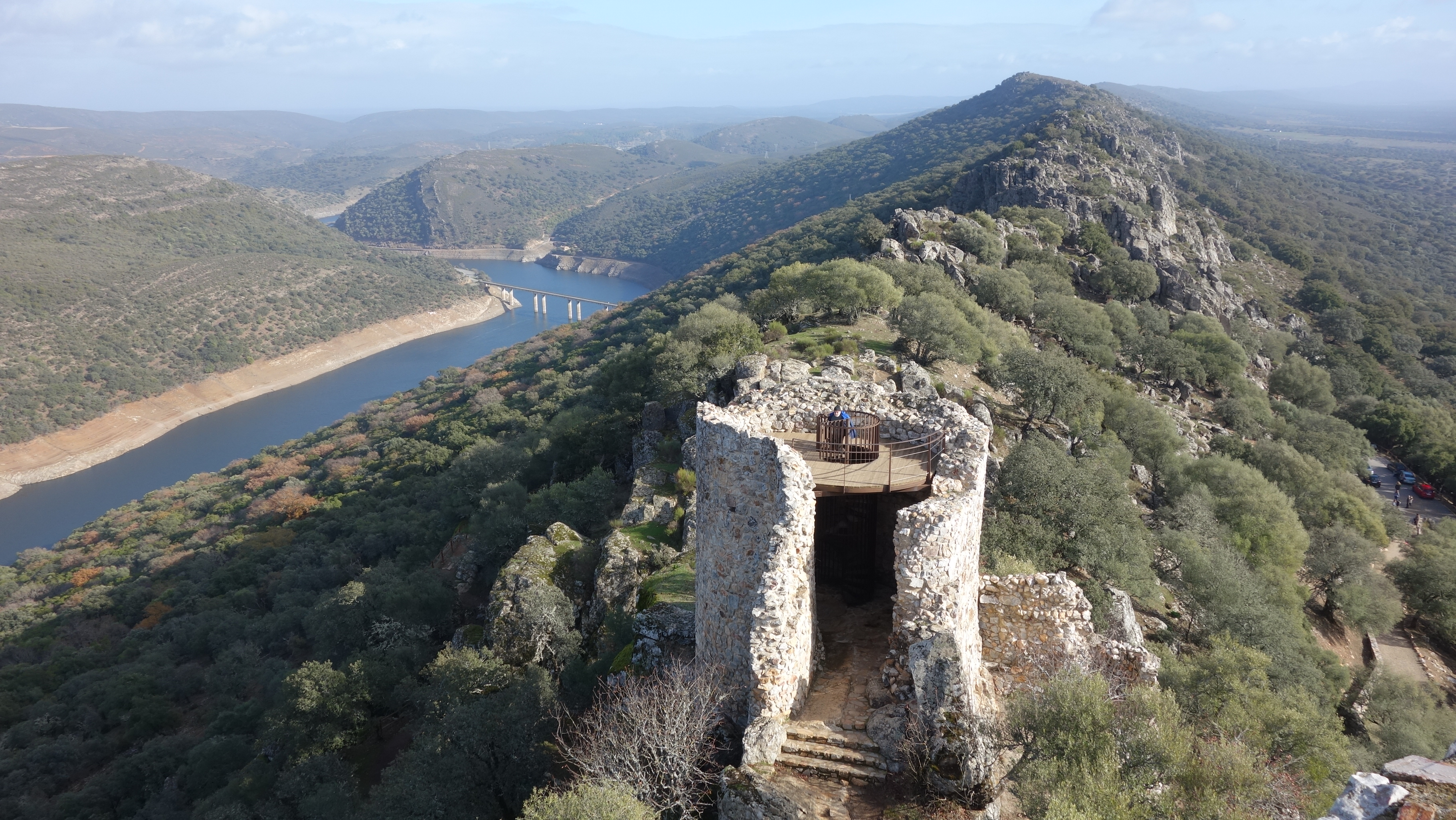 Monfragüe This is a photography of a Special Area of Conservation in Spain with the ID: ES4320077. Natura2000 entry, EEA entry